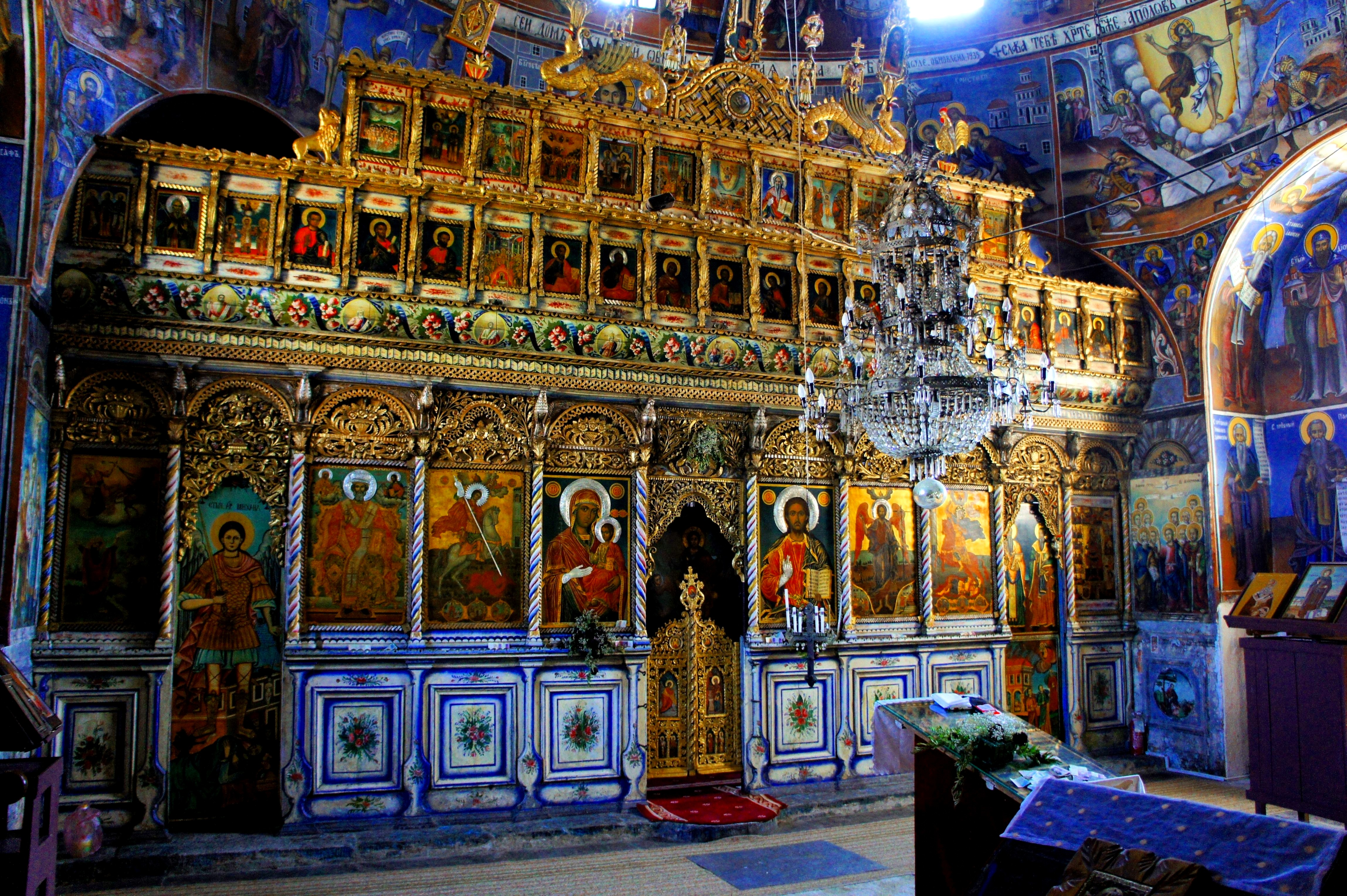 Иконостасот кој што е изработен во оваа црква претставува убаво уметничко дело, кое што со својата големина од 7 метри височина и 8 метри ширина и е дело на лазоровецот Наум Тајтински. Целиот иконостас е изработен од дрво, во поголемиот дел од ореовина, работен во препознатливиот стил на Мијачката резбарска школа.